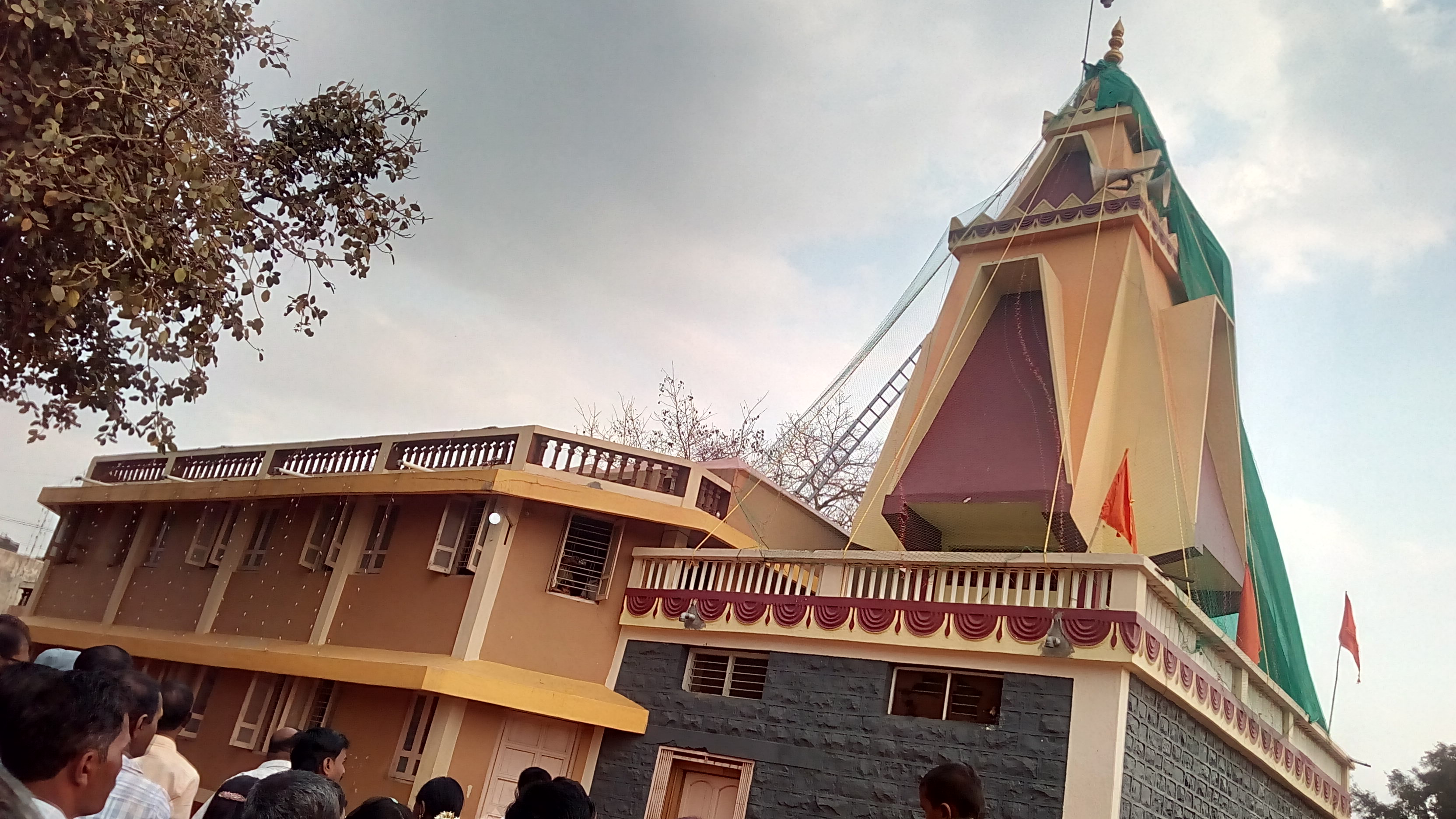 basaveshwar temple